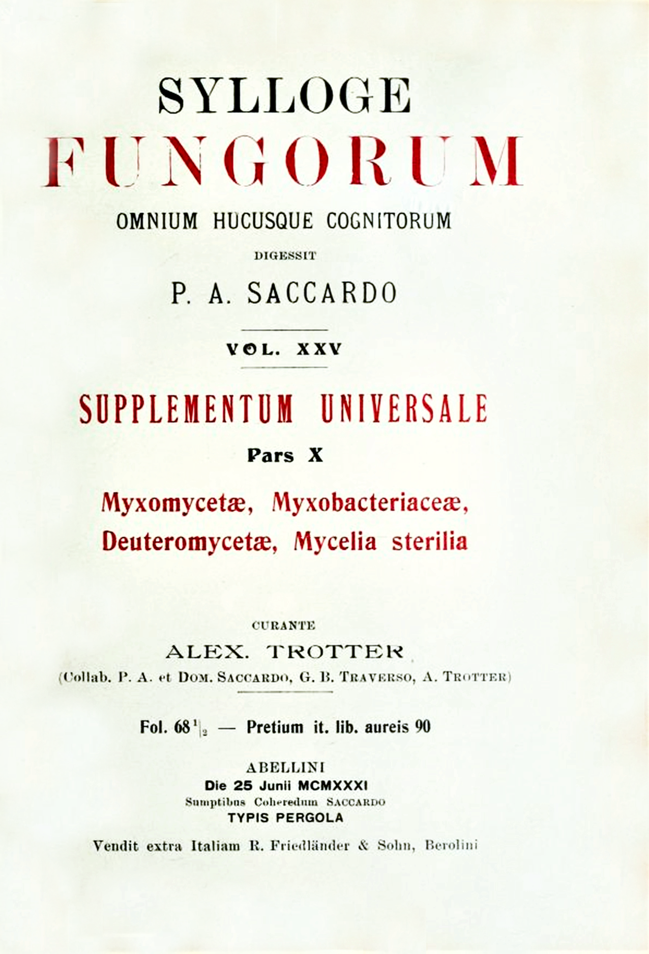 Sylloge Fungorum, vol. 25, 1. Seite